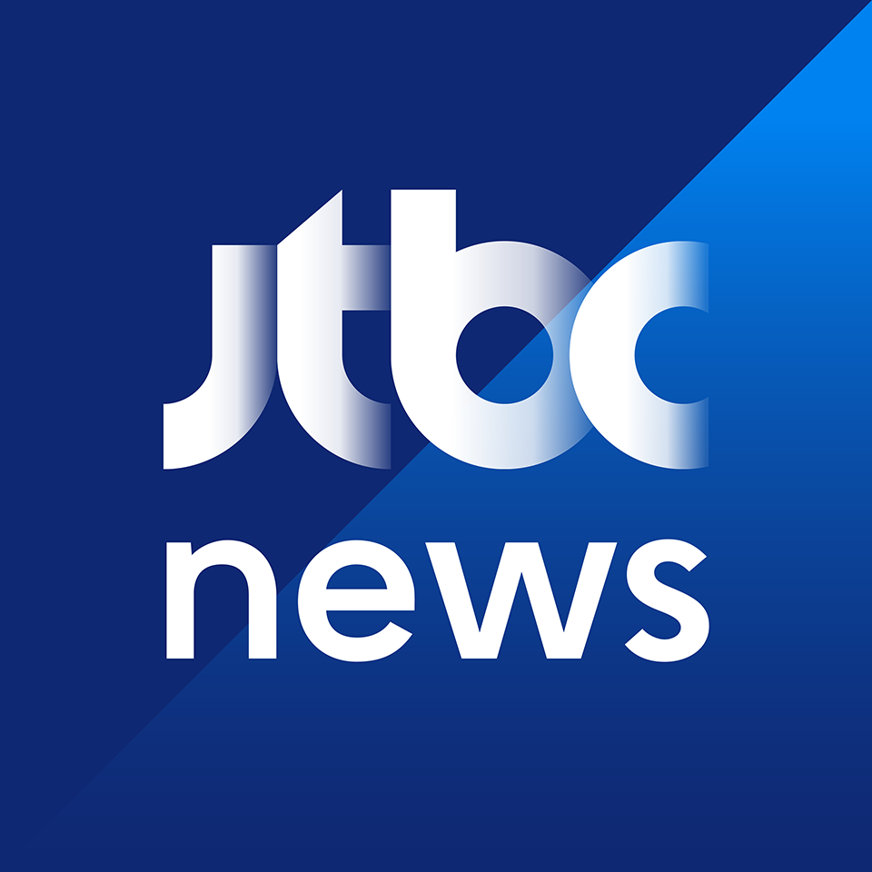 JTBC 뉴스 대표 브랜드 로고입니다.